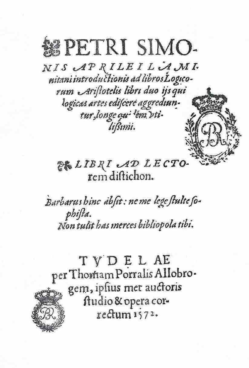 Tomás Porralis, Pedro Simon Abril. Aristóteles. Pamplona 1572